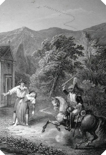 Incisione tratta da "La bella di Camerda" (1857), novella di Emidio Cappelli